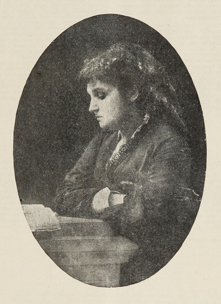 Rosario Orrego Castañeda -conocida también como Rosario Orrego de Uribe, Rosario Orrego de Chacón o su seudónimo Una madre (Copiapó, 1831 - Valparaíso, 21 de mayo de 1879) fue una novelista, poeta, editora, periodista y educadora chilena,1​ considerada la primera mujer novelista de Chile,2​3​ una pionera en el campo poético femenino en dicho país4​ y una de las precursoras de la literatura femenina a nivel de Hispanoamérica.1​ Cultivó la novela y poesía, e inició su carrera literaria en la La Semana;5​ como editora, fundó en 1873 la revista Valparaíso, donde colaboraron además, tres de sus hijos.6​ Fue también, la primera mujer en integrar una academia de literatos: la Academia de las Bellas Letras en Santiago, conformada a mediados del siglo XIX por la élite intelectual chilena.6​